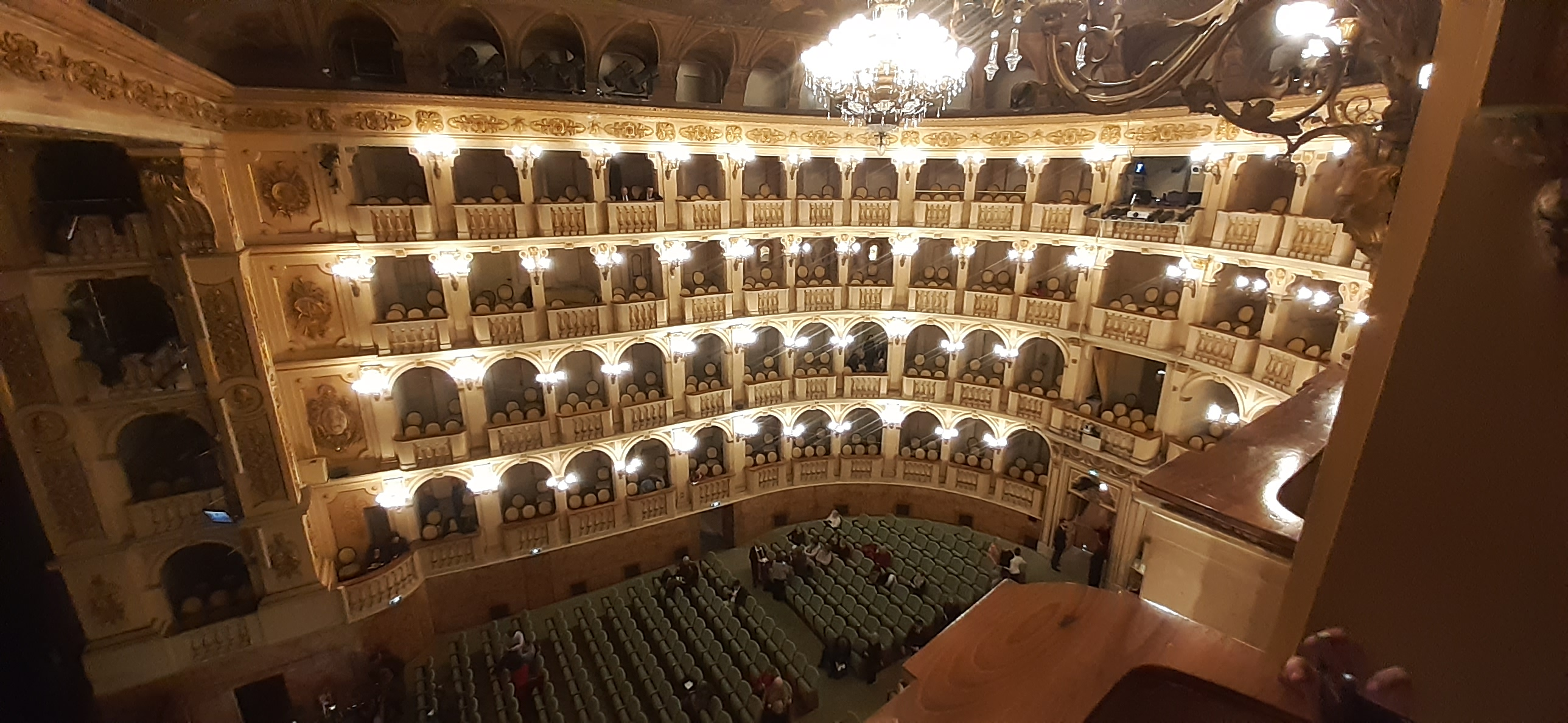 L'interno del teatro comunale di Bologna